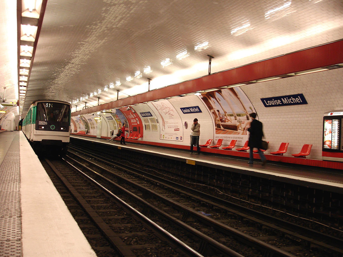 La station Louise Michel de la ligne 3 du métro de Paris, France